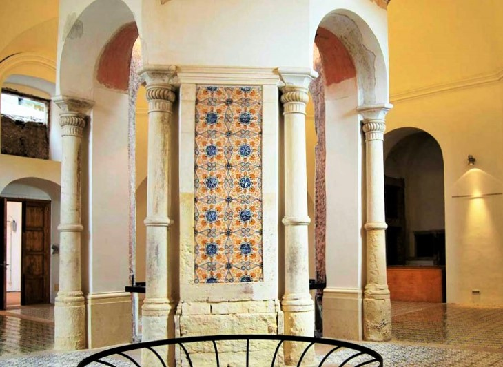 Cucine del Monastero dei Benedettini di San Nicolò l'Arena di Catania